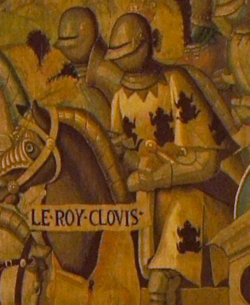 Détail du baptème de Clovis, il est représenté ici avec une livrée de trois crapeaux.